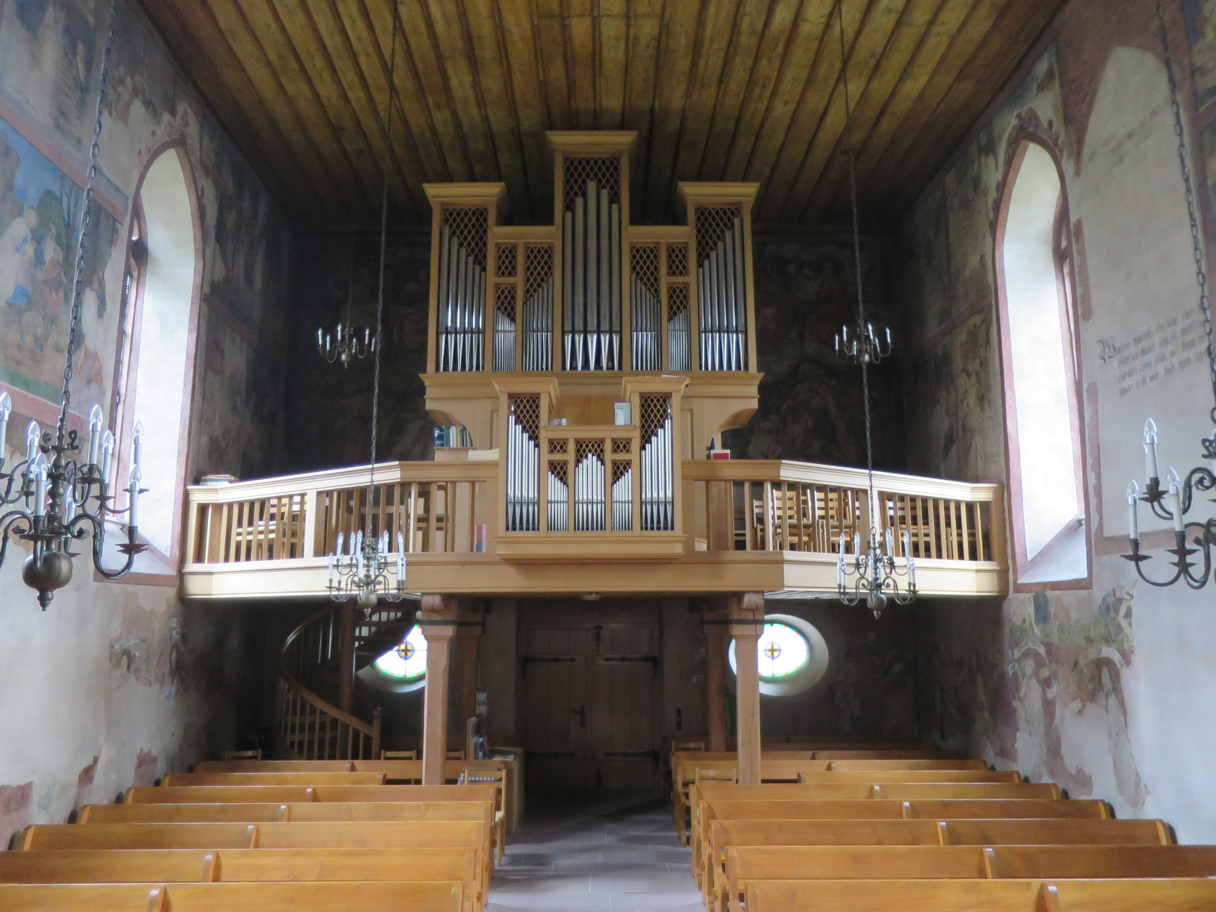 Reformierte Kirche St. Argobast, Muttenz BL, Schweiz, Orgelempore